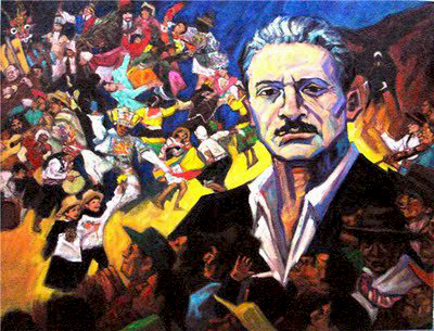 Pintura en homenaje a José María Arguedas y su pueblo